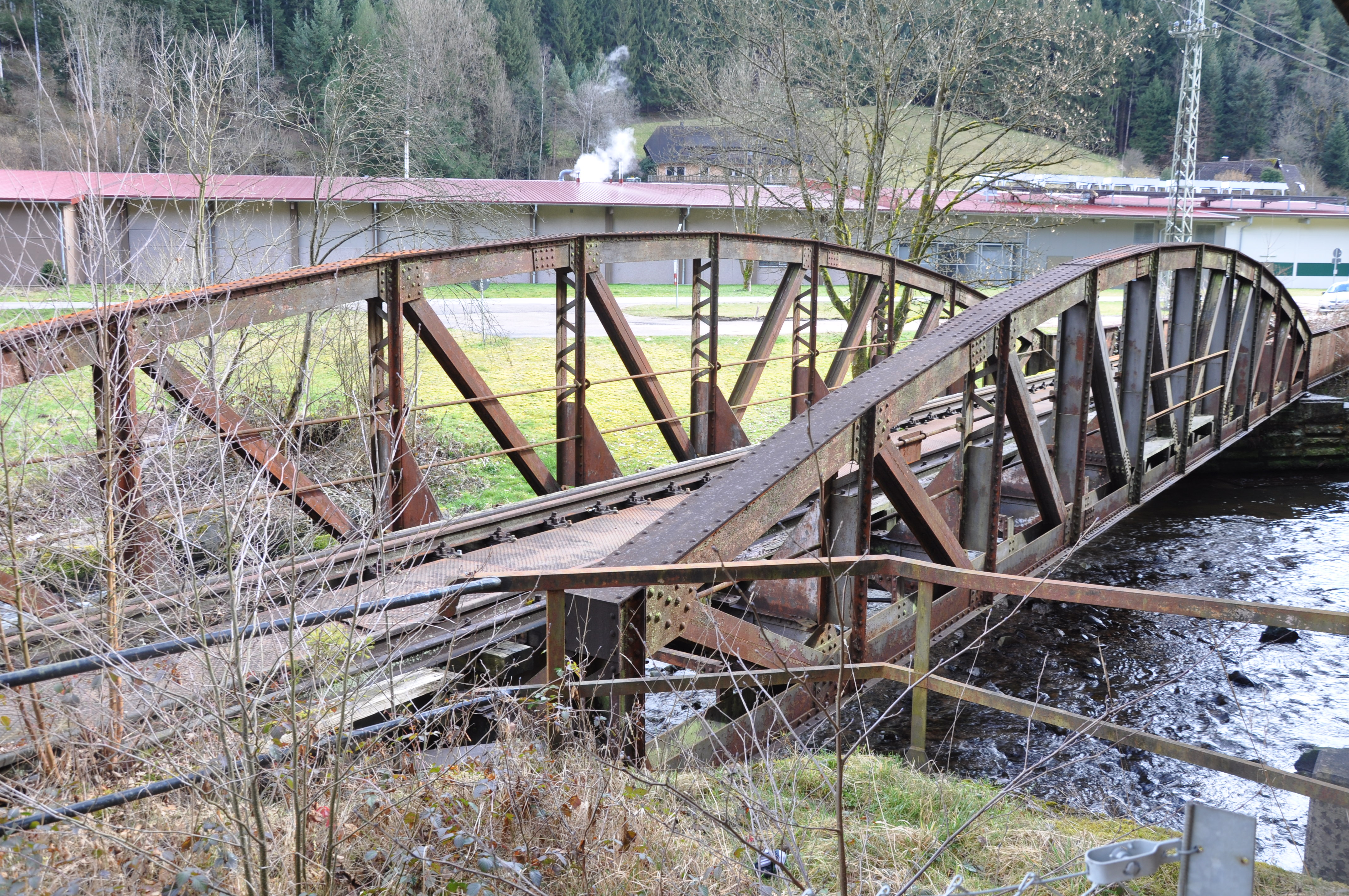 ehemalige Eisenbahnbrücke Sommerwiese in Schiltach